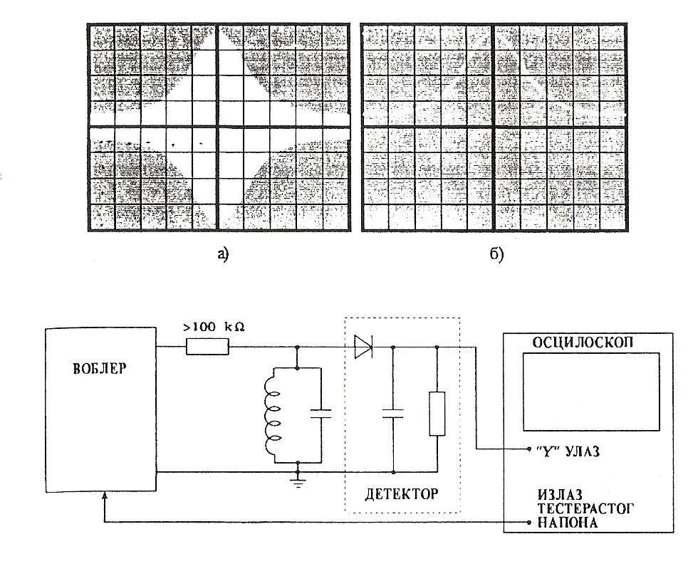 treca slika